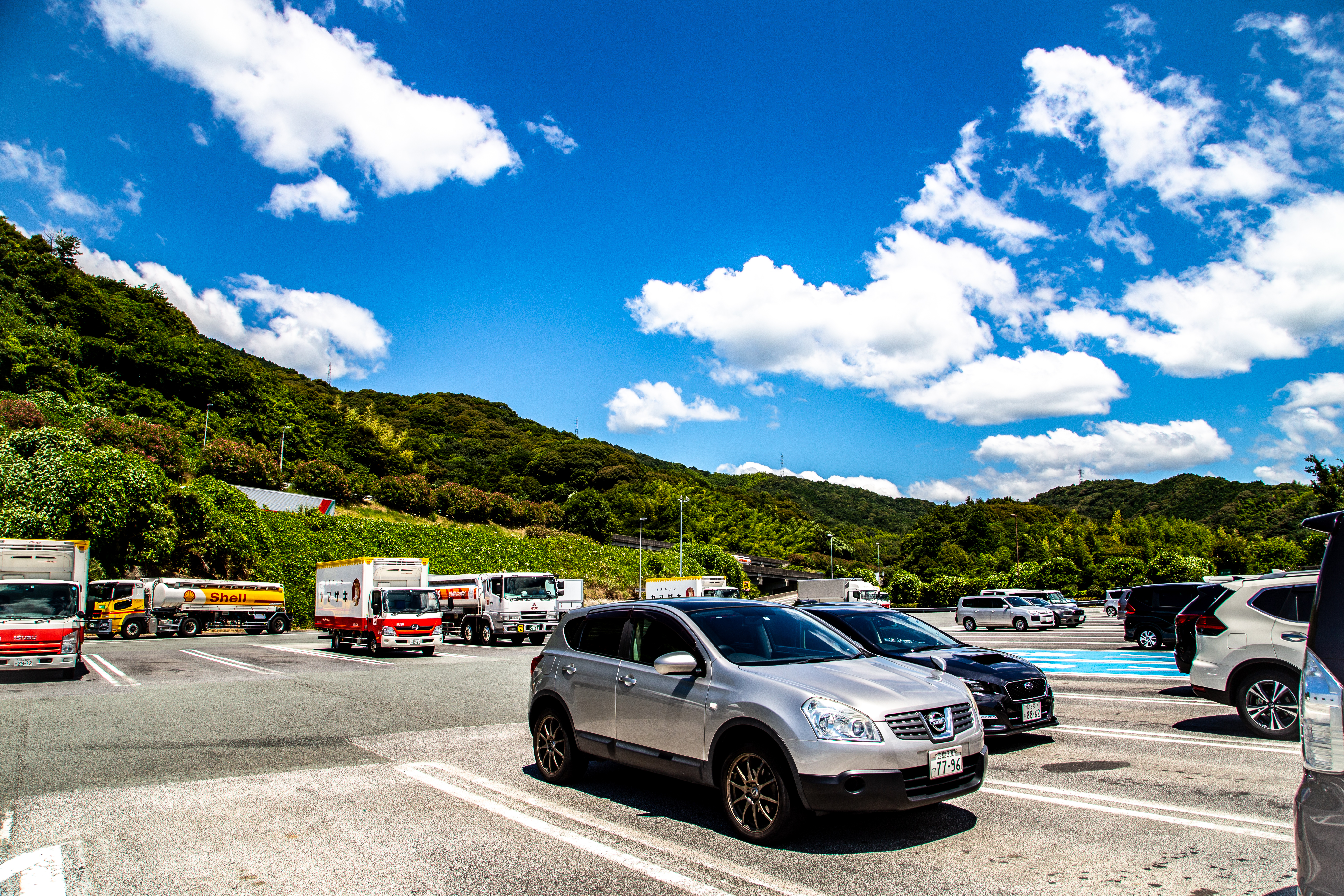 山口県防府市富海PAの駐車場。